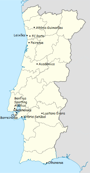 Carta dos clubes participantes do campeonato de portugal de futebol de primeira divisao 1962-1963